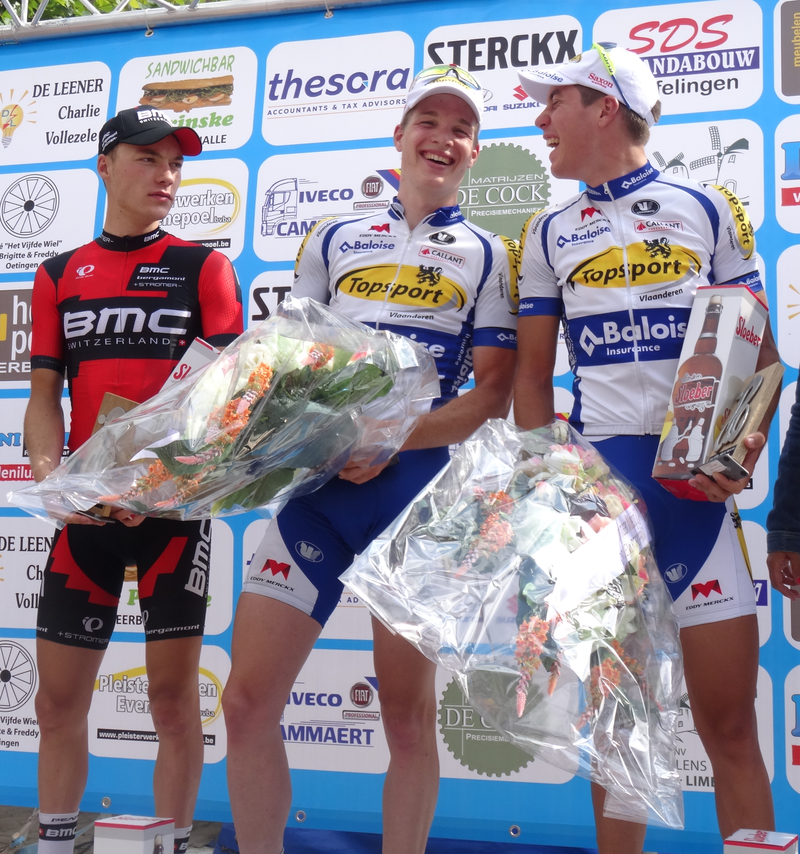 Reportage photographique réalisé le mercredi 25 juin à l'occasion du départ et de l'arrivée de l'Internationale Wielertrofee Jong Maar Moedig 2014 à Oetingen (Gooik), Belgique.